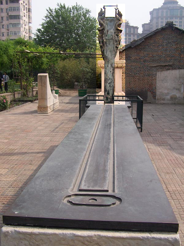 instrument in Beijing Ancient Observatory